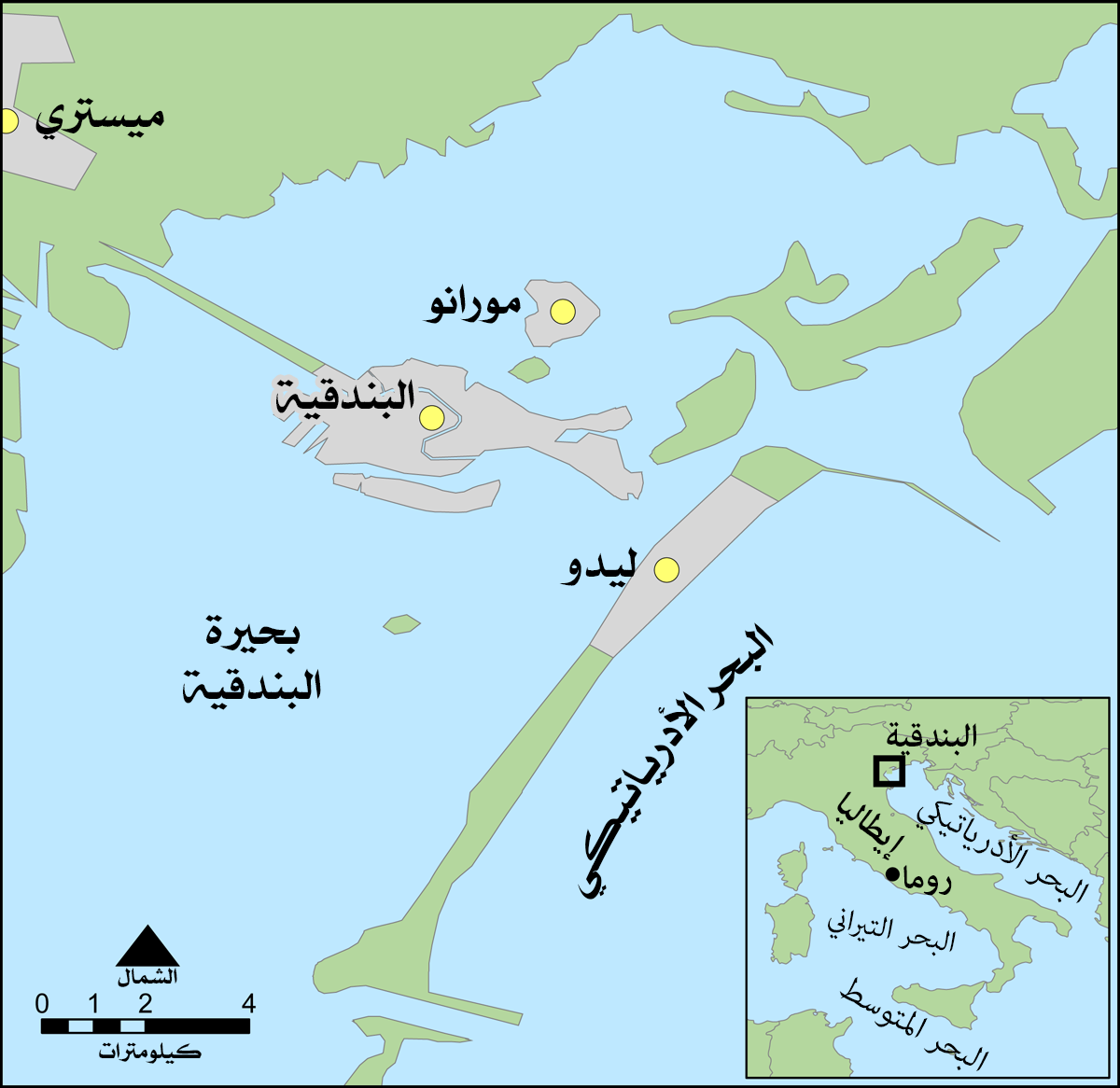 خريطة لبحيرة البندقية